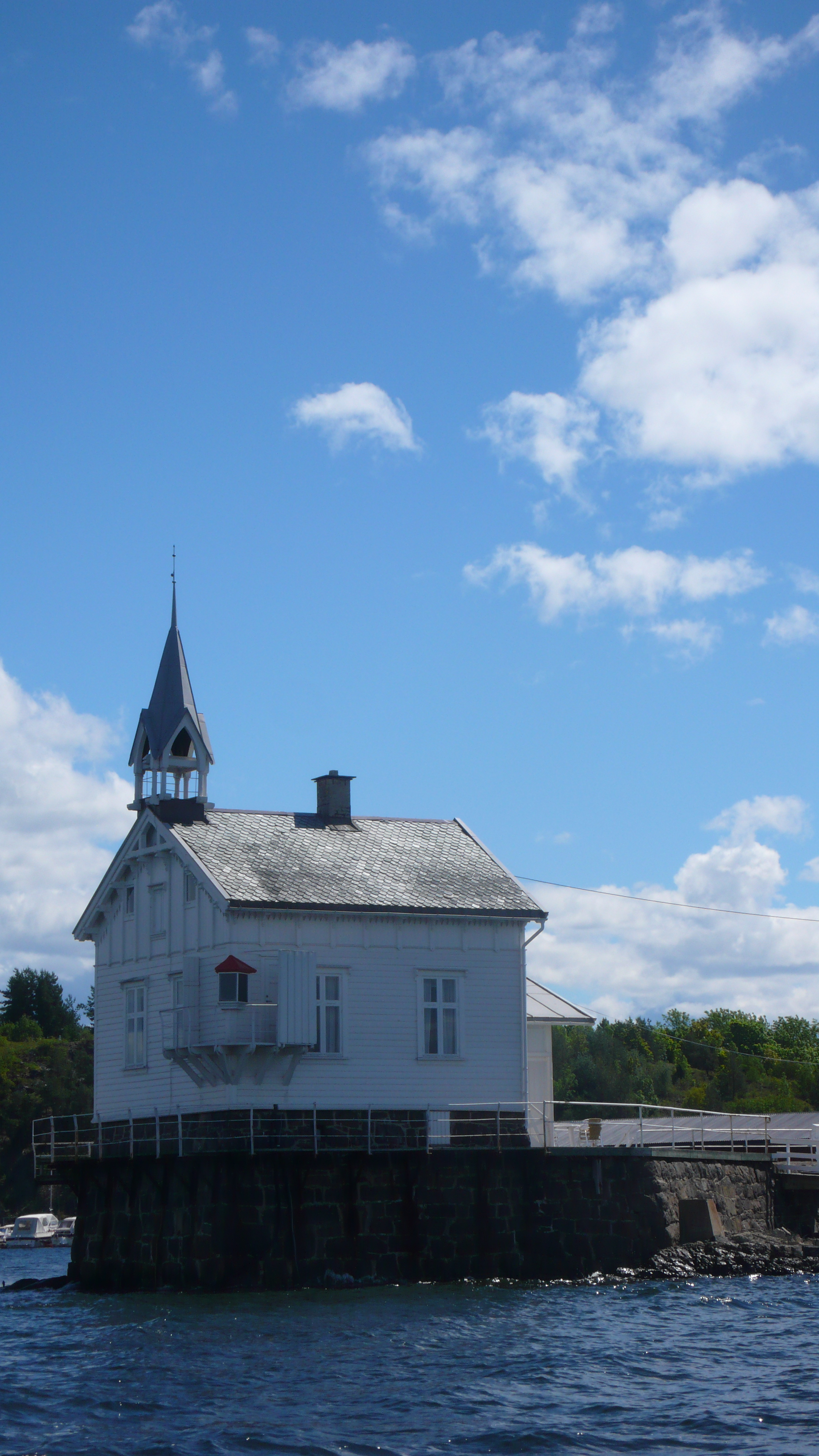 Heggholmen fyrstasjon i indre Oslofjord Heggholmen lighthouse in the Oslo fjord